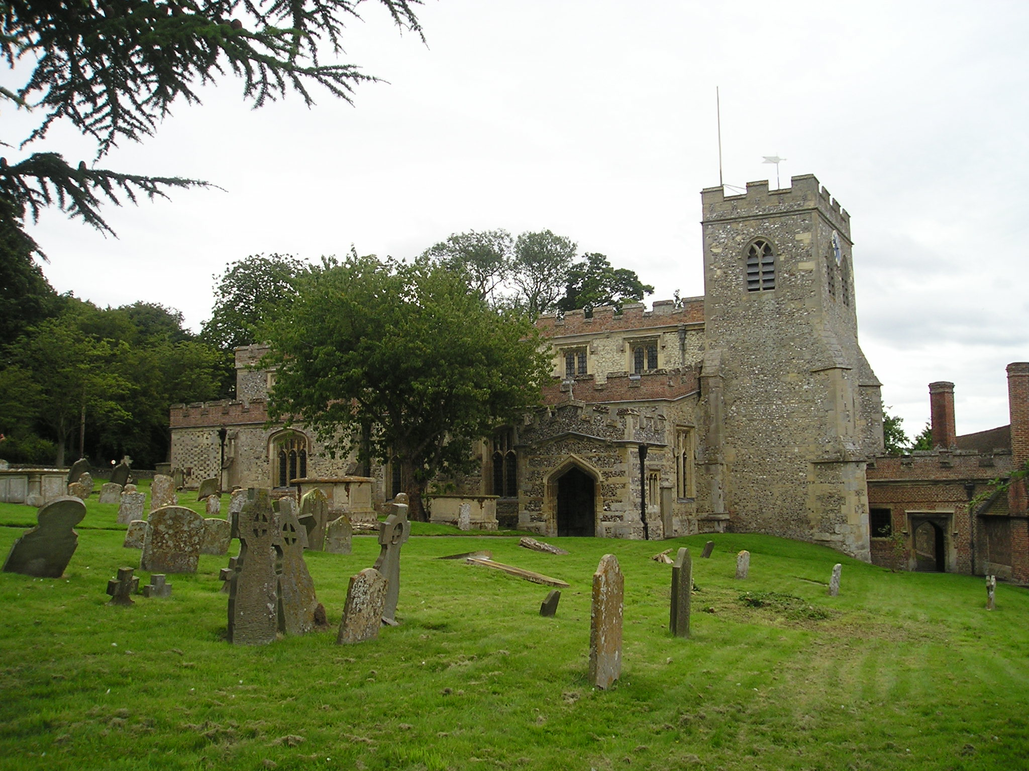 Ewelme,_Kirche_St_Mary_the_Virgin_mit_baulicher_Verbindung_zu_den_Almshouses